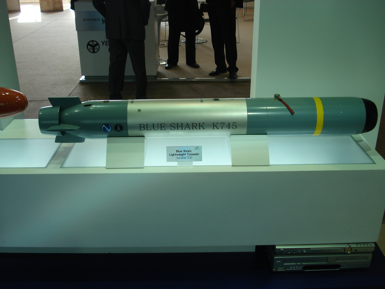 IDEF '07 Savunma Fuarı'nda çekildi.Blue Shark Hafif Torpido. 23 Mayıs 2007